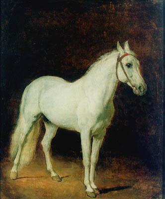 Белая лошадь. Этюд